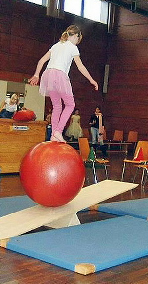 fotografiert am 22.12.05, Mädchen balanciert auf einer Kugel über eine Wippe (Turnhalle).